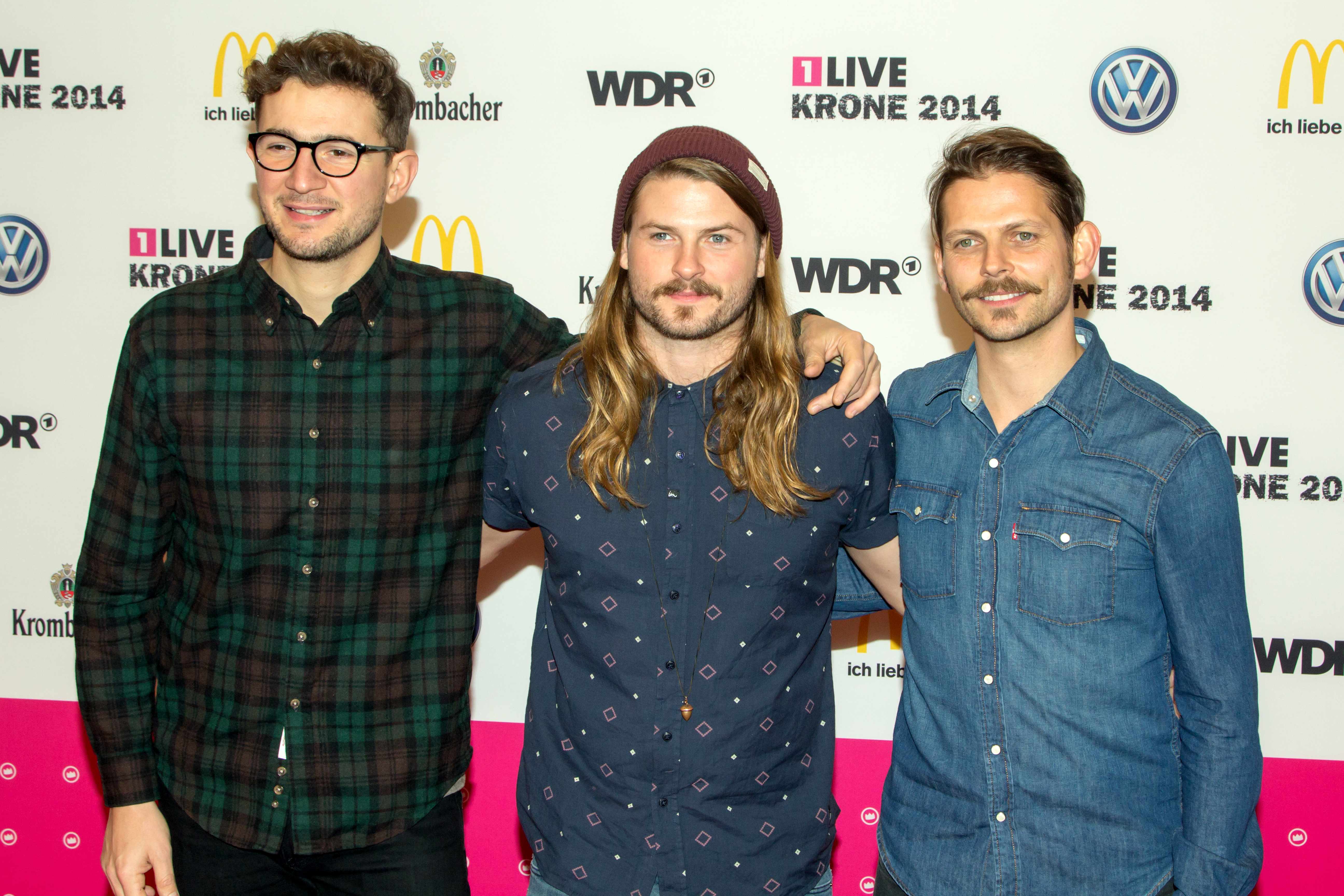 1LIVE Krone 2014 in der Bochumer Jahrhunderthalle: Mighty Oaks auf dem roten Teppich